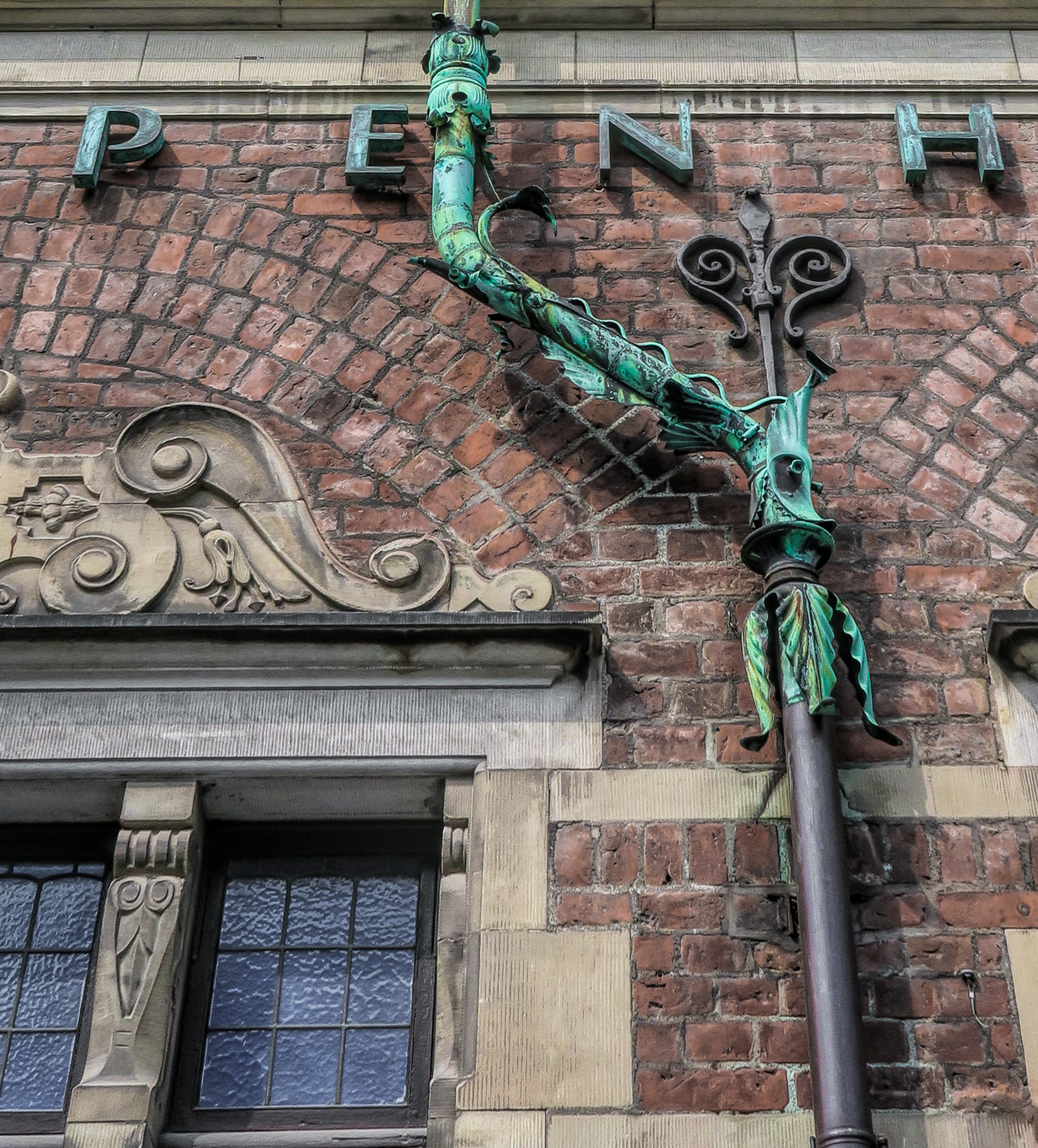 Eater pipes at Amagertorv in Copenhagen, Denmark"Copenhagen street"